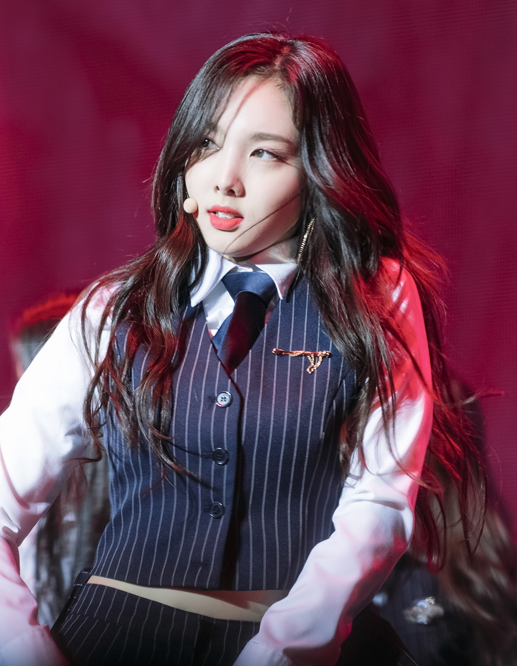 180519 트와이스랜드 마지막 날